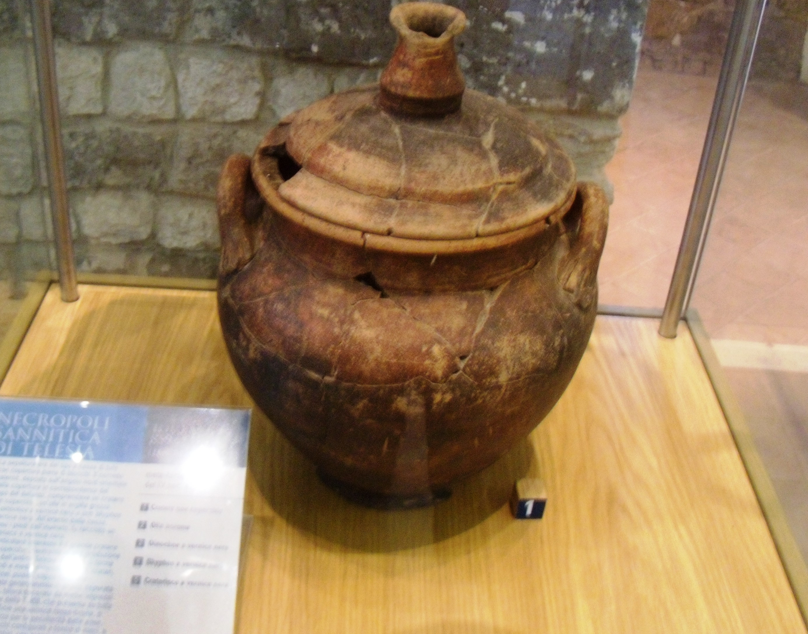 Uno dei reperti provenienti dalle necropoli sannite di Telesia. Antiquarium di Telesia presso l'Abbazia benedettina del Santissimo Salvatore in San Salvatore Telesino, provincia di Benevento.